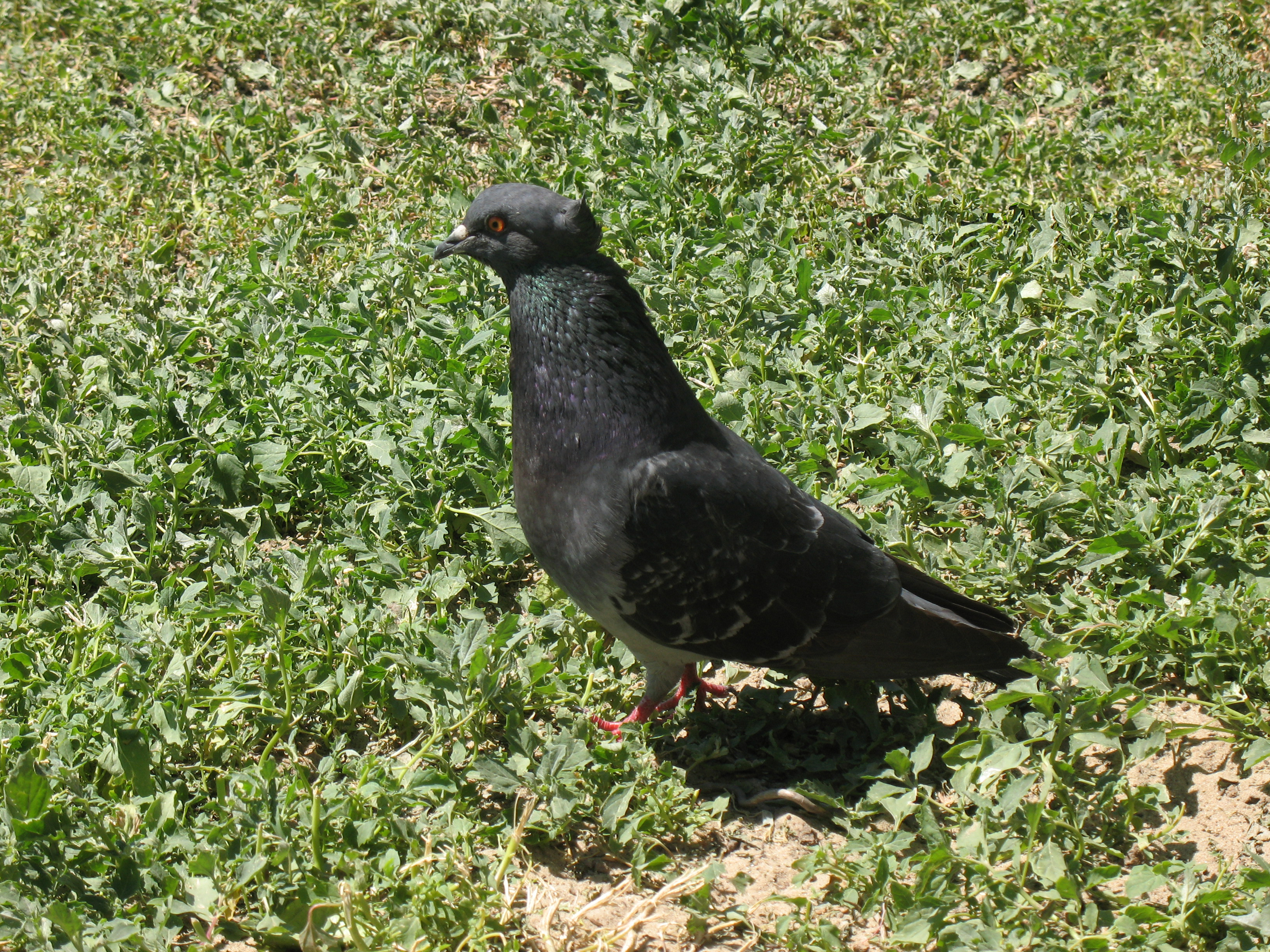 Columba livia in Kharkov.